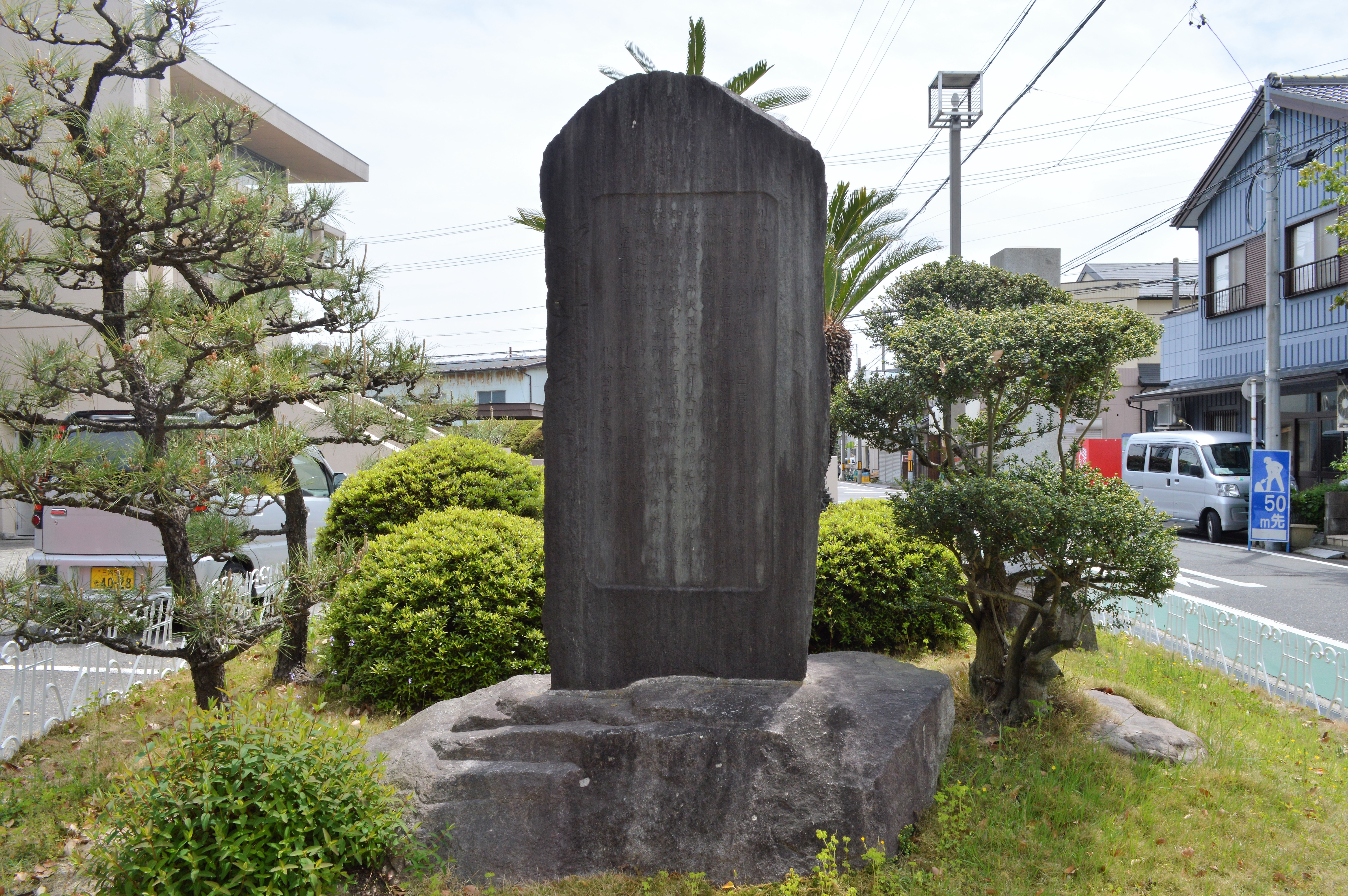 刈谷市城町図書館の敷地内にある刈谷町図書館の創設記念碑。